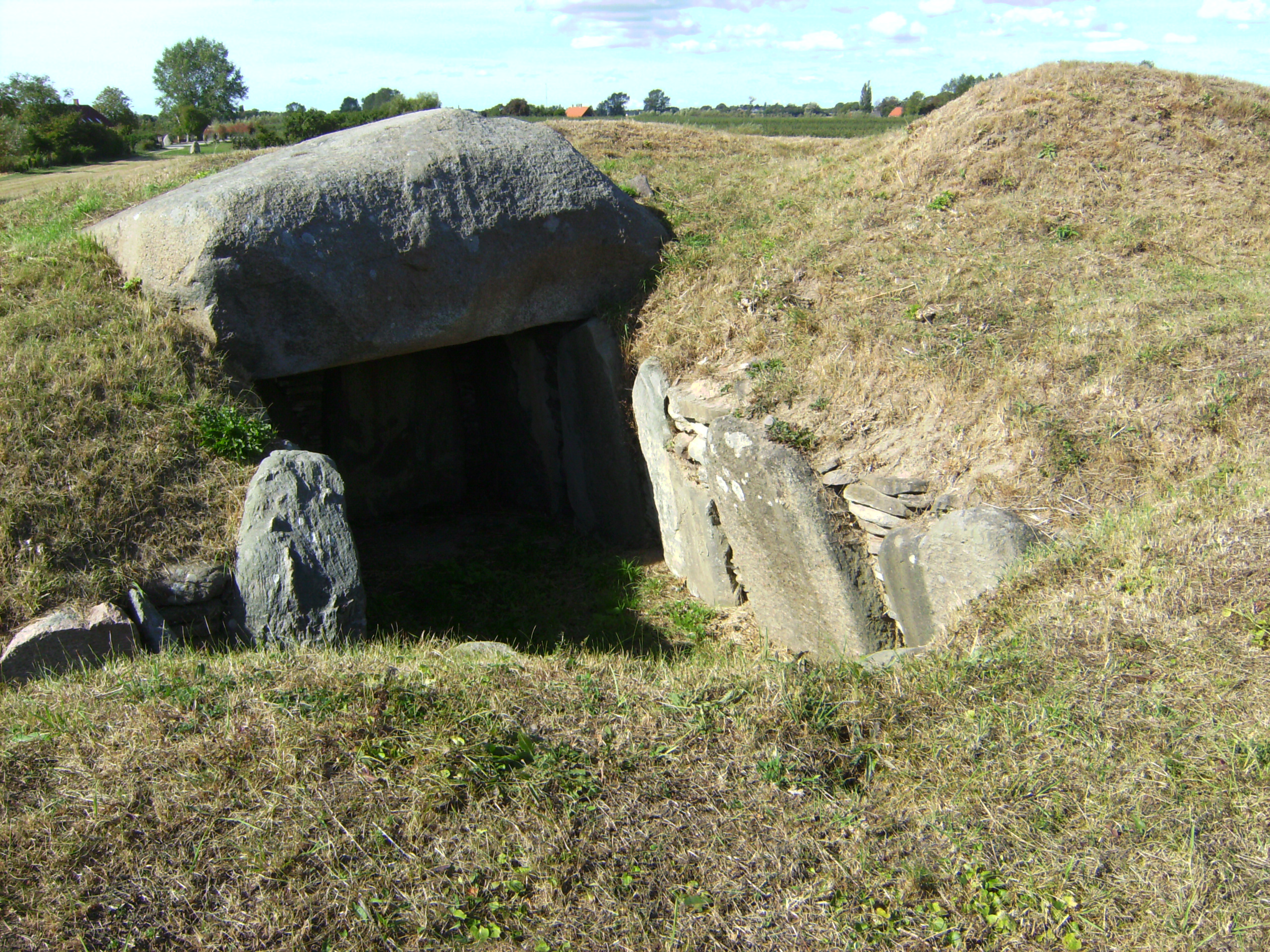 Oldtidsgrave i Kettinge Sogn nord for Nysted Dolmens in a north of Nysted, Denmark